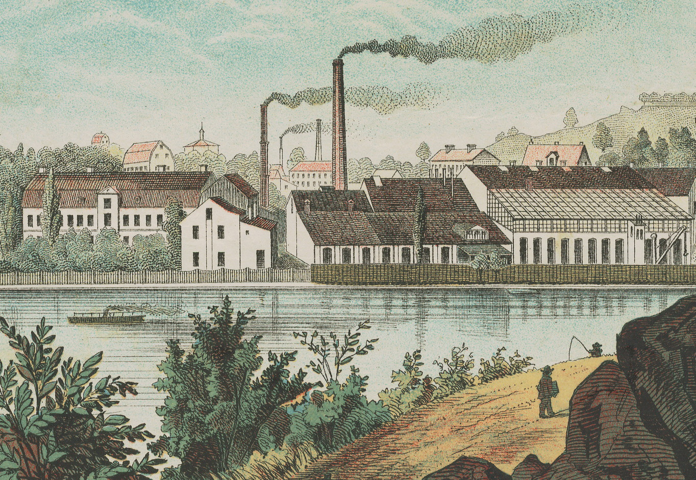 Liljeholmens stearinfabrik på Södermalm, vy från öster över Hammarby sjö